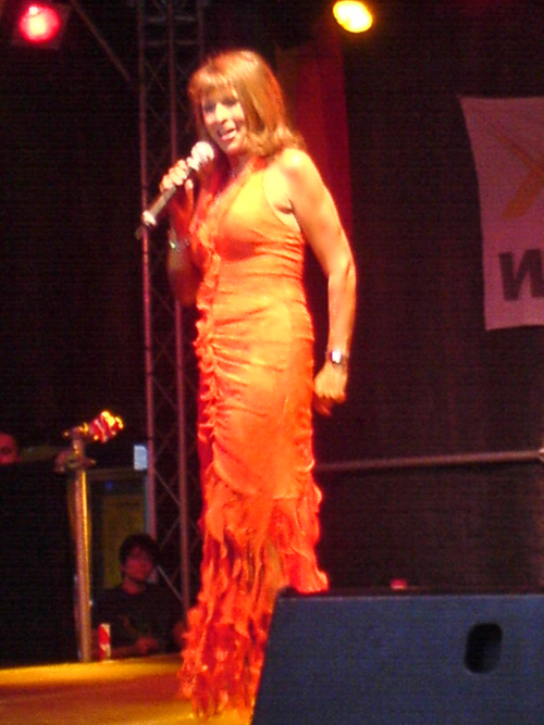 Ireen Sheer, deutsch-britische Schlagersängerin